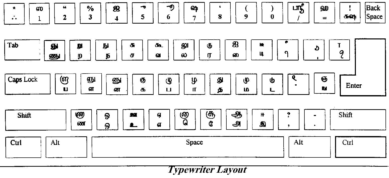 தமிழ் தட்டச்சு முறை விசைப்பலகை தளக்கோலம்